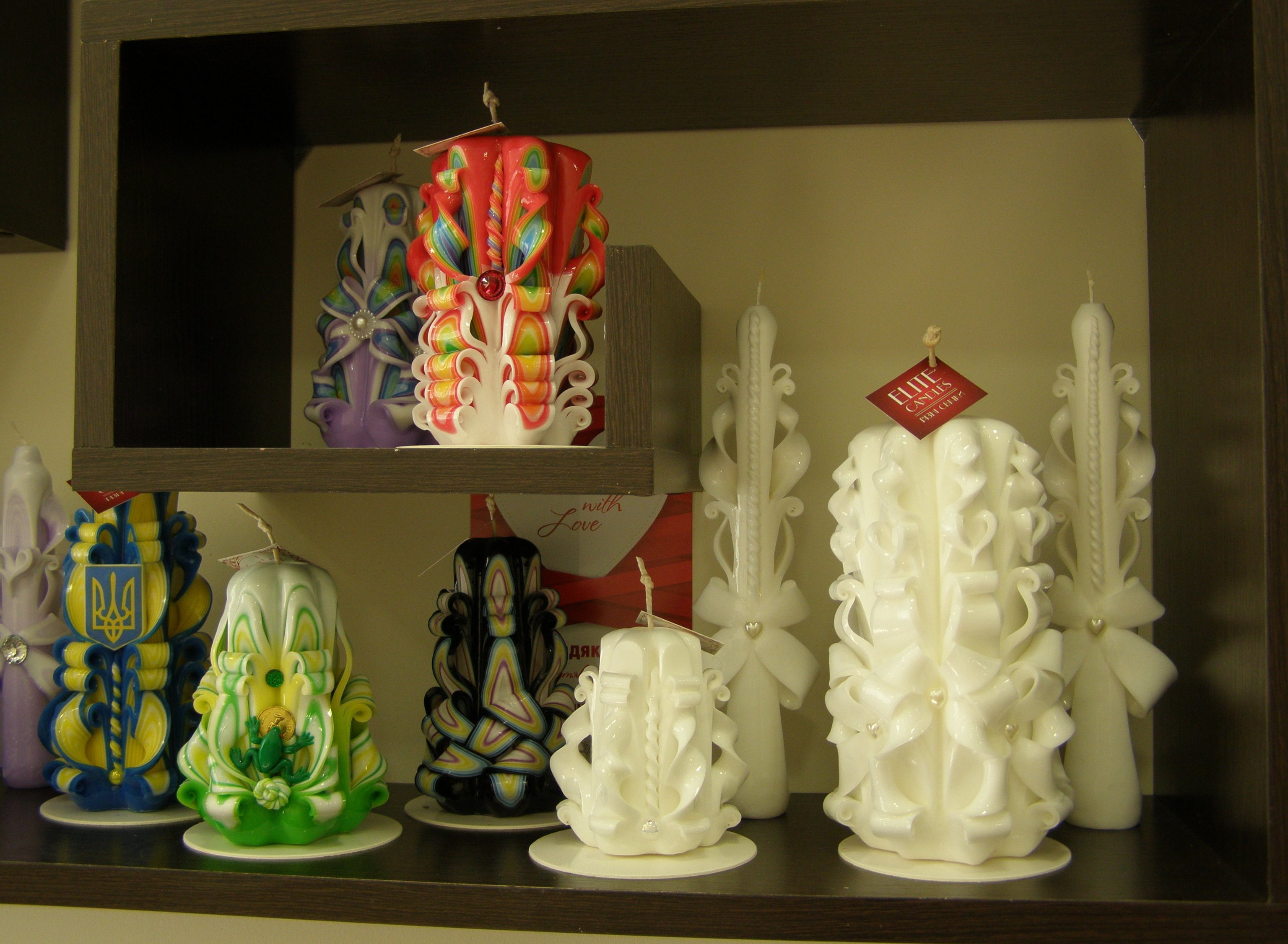 Резные свечи ручной работы от мастерской ELITE CANDLES